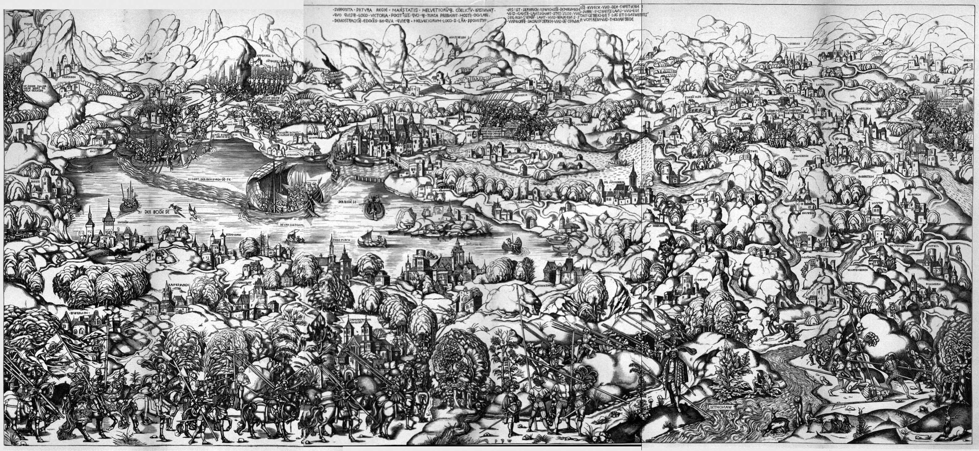 Der Schwabenkrieg 1499: Kupferstich des Monogrammisten P.P.W. Am linken oberen Bildrand die Schlacht bei Frastanz. Im Vordergrund links das Gefecht bei Hard. Weiter rechts bei Konstanz die Schlacht bei Schwaderloh. Noch weiter rechts die Eroberung von Tengen. Und am ganz rechten oberen Bildrand, die entscheidende Schlacht bei Dornach. Der obere Teil des Bildes nimmt die Darstellung der Eidgenossenschaft auf. Man blickt gegen die Alpen.Der mittlere Teil stellt den Bodensee und den Hegau dar. Sehr liebevoll wird schriftlich und bildlich dargestellt, wie der Rhein, dessen Ursprung in den Alpen übrigens auch verzeichnet ist, durch den Bodensee fliesst. Der Vordergrund stellt Oberschwaben dar. Hier sieht man sehr detailreich, heranziehende Truppen des Schwäbischen Bundes. Die Donau ist vorne rechts zu sehen. Ihr Ursprung im Schwarzwald ebenfalls vermerkt. Von ursprünglich sechs Stichen sei nur dieses vollständige Exemplar erhalten. Es befand sich (1897) im Germanischen Nationalmuseum in Nürnberg.